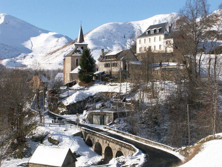 Entrée du village de Portet-de-Luchon avec une vue sur le presbytère.